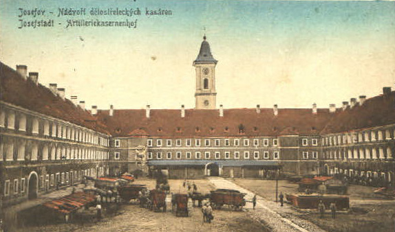 Innenhof der k.u.k. Artillerie-Kaserne in Josefstadt